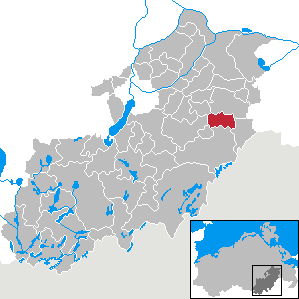 Helpt in Mecklenburg-Vorpommern, Landkreis Mecklenburg-Strelitz